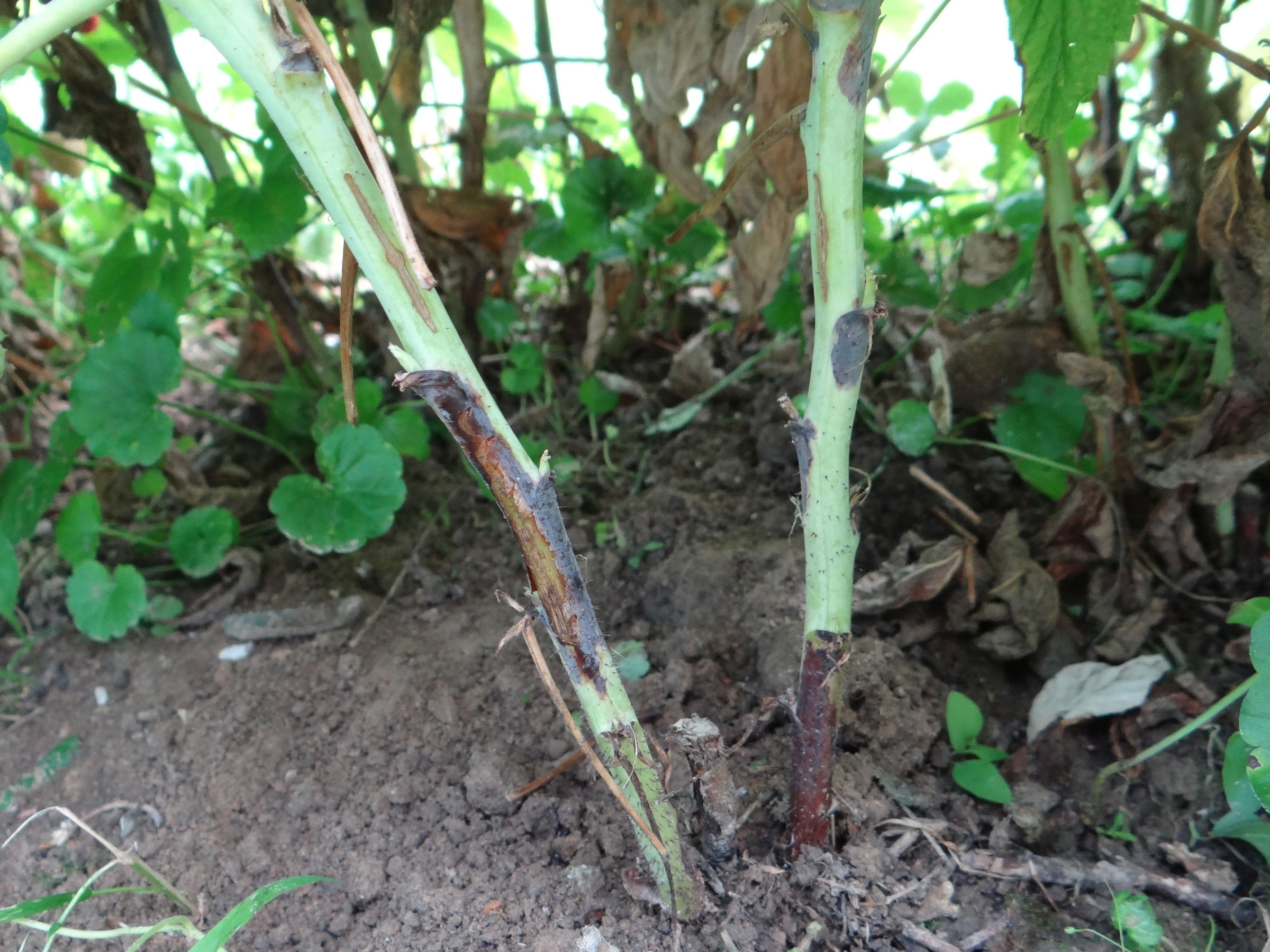 Didymella applanata on Rubus